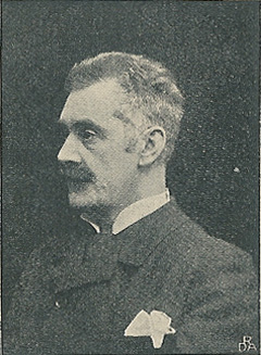 Peter Frederik Rist.